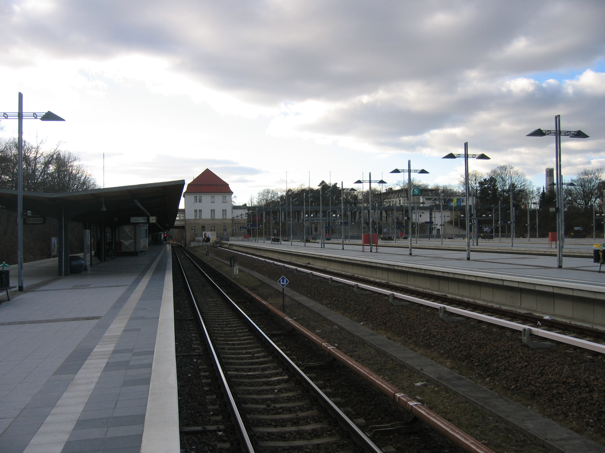 S-Bahnhof Berlin Olympiastadion, Bahnsteige